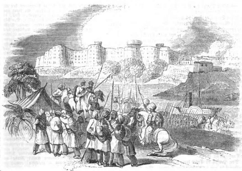 Hyderabad.